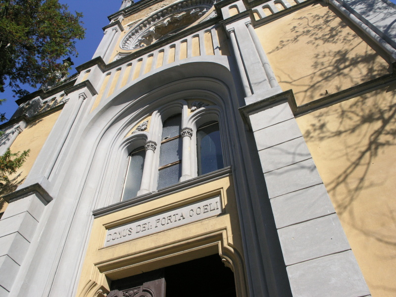 kaple